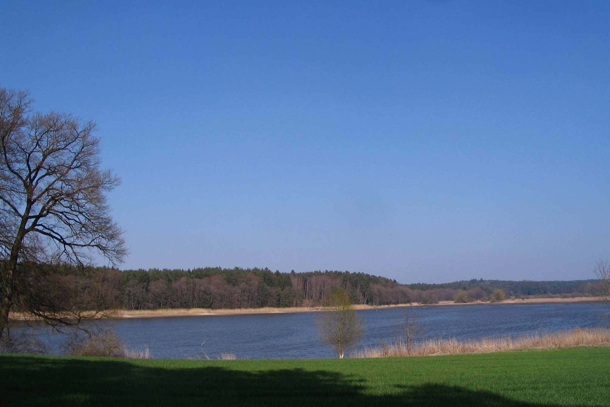 Straßberger Weiher im Dürnbucher Forst